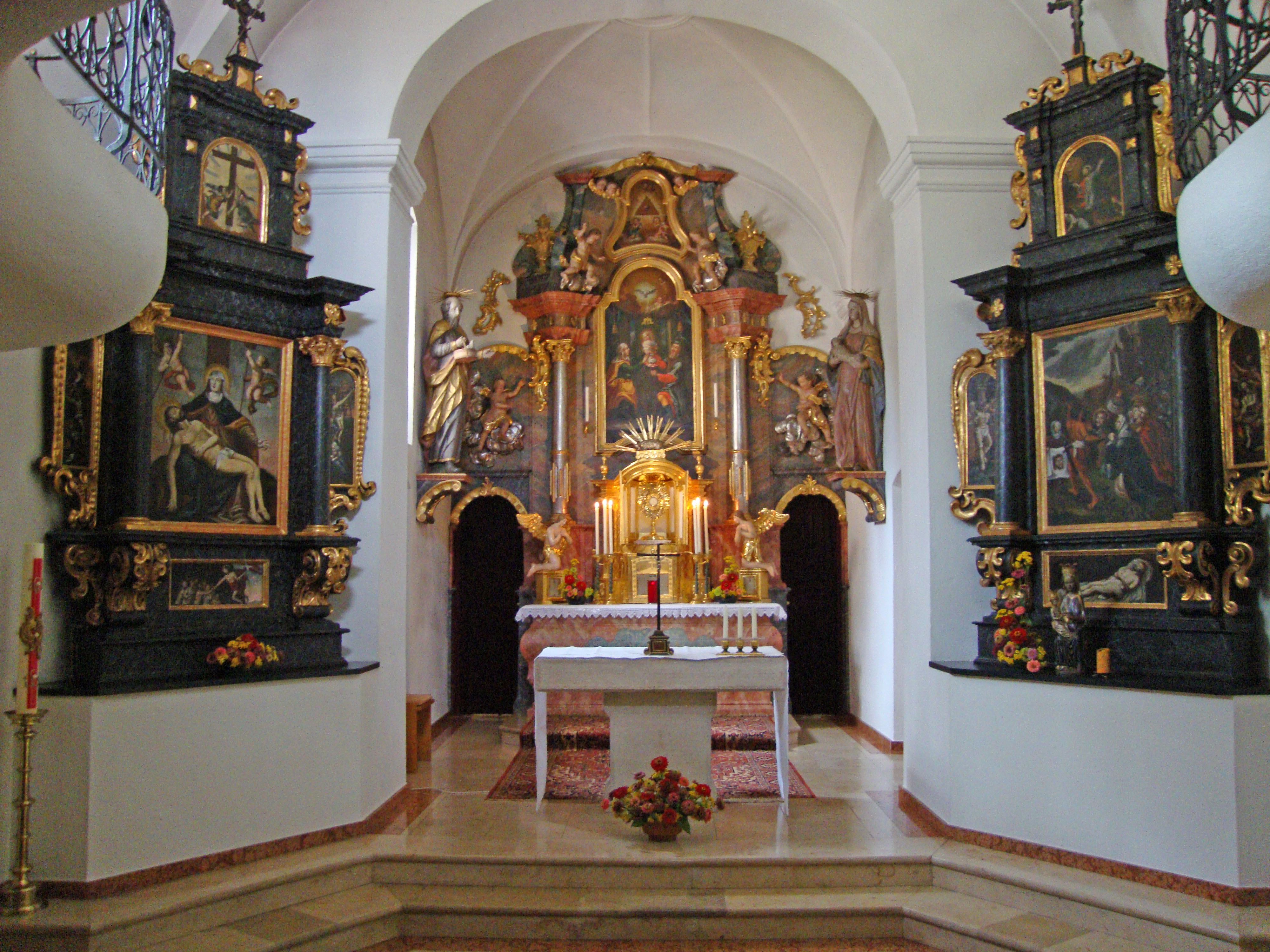 Heiliger Berg Karmel mit Kirche, Kloster, Kreuzweg und Hl.-Grab-Kapelle